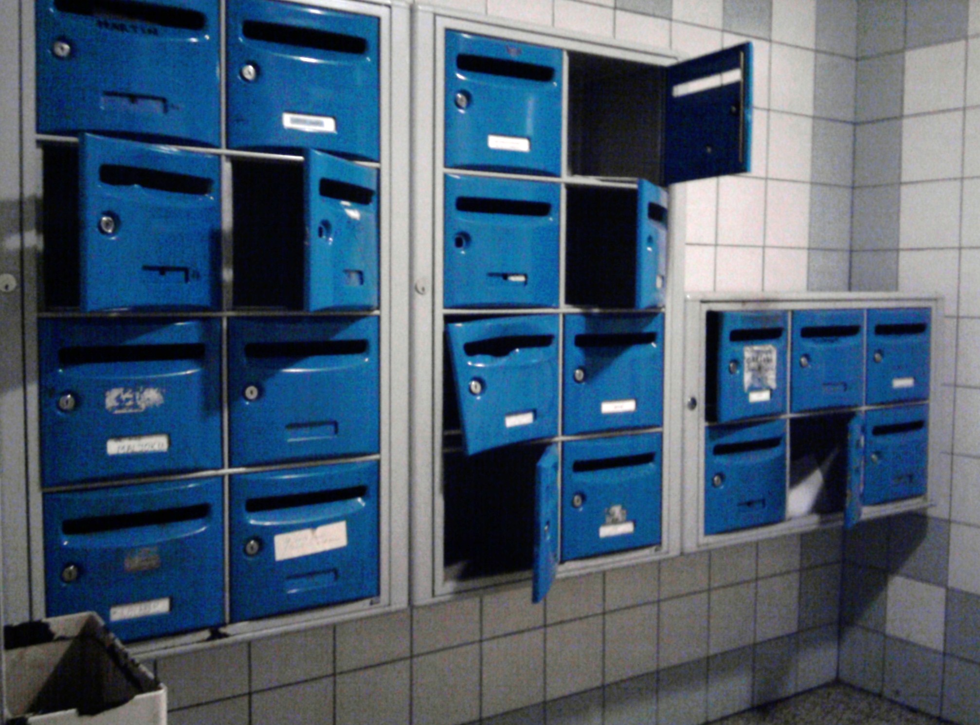 Boîtes aux lettres d'une cage d'un bâtiment de Planoise, à Besançon (Doubs, France).